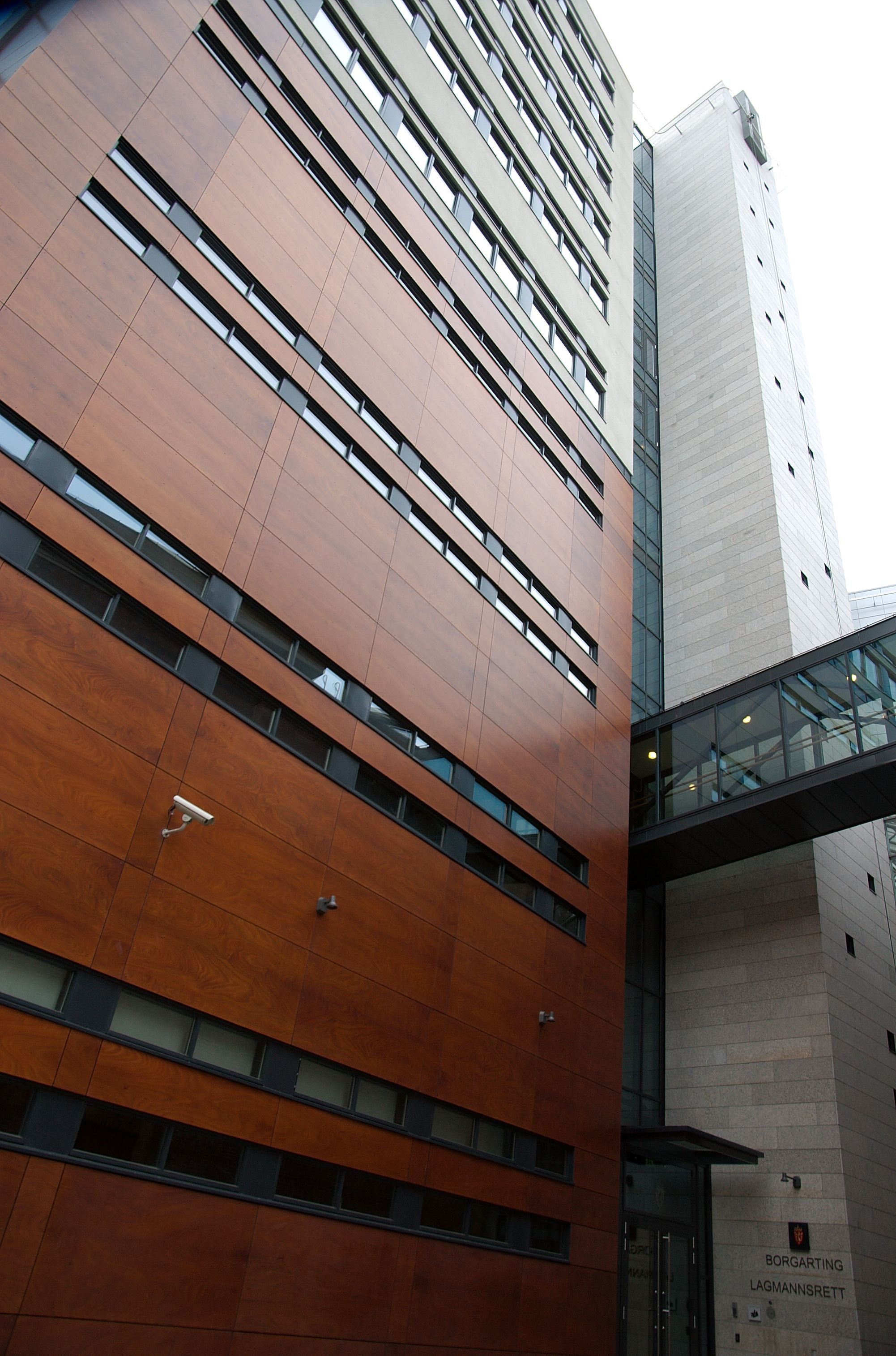 Borgarting Lagmannsrett i Munchs gate i Oslo. Den nye bygningen sto ferdig i 2005 og er tegnet av DARK Arkitekter i samarbeid med Solheim Jacobsen Arkitekter og Zinc AS.